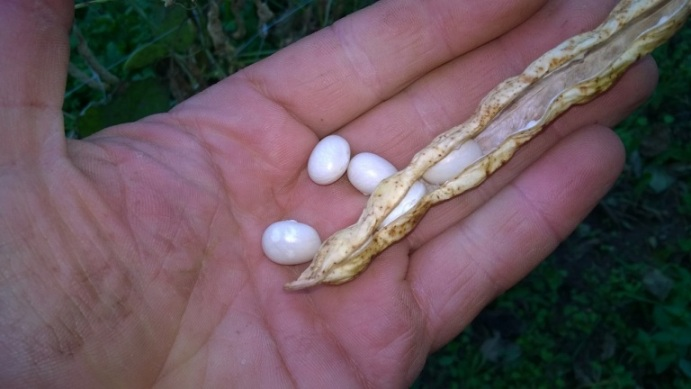 Fagiolo della Regina di Gorga secco